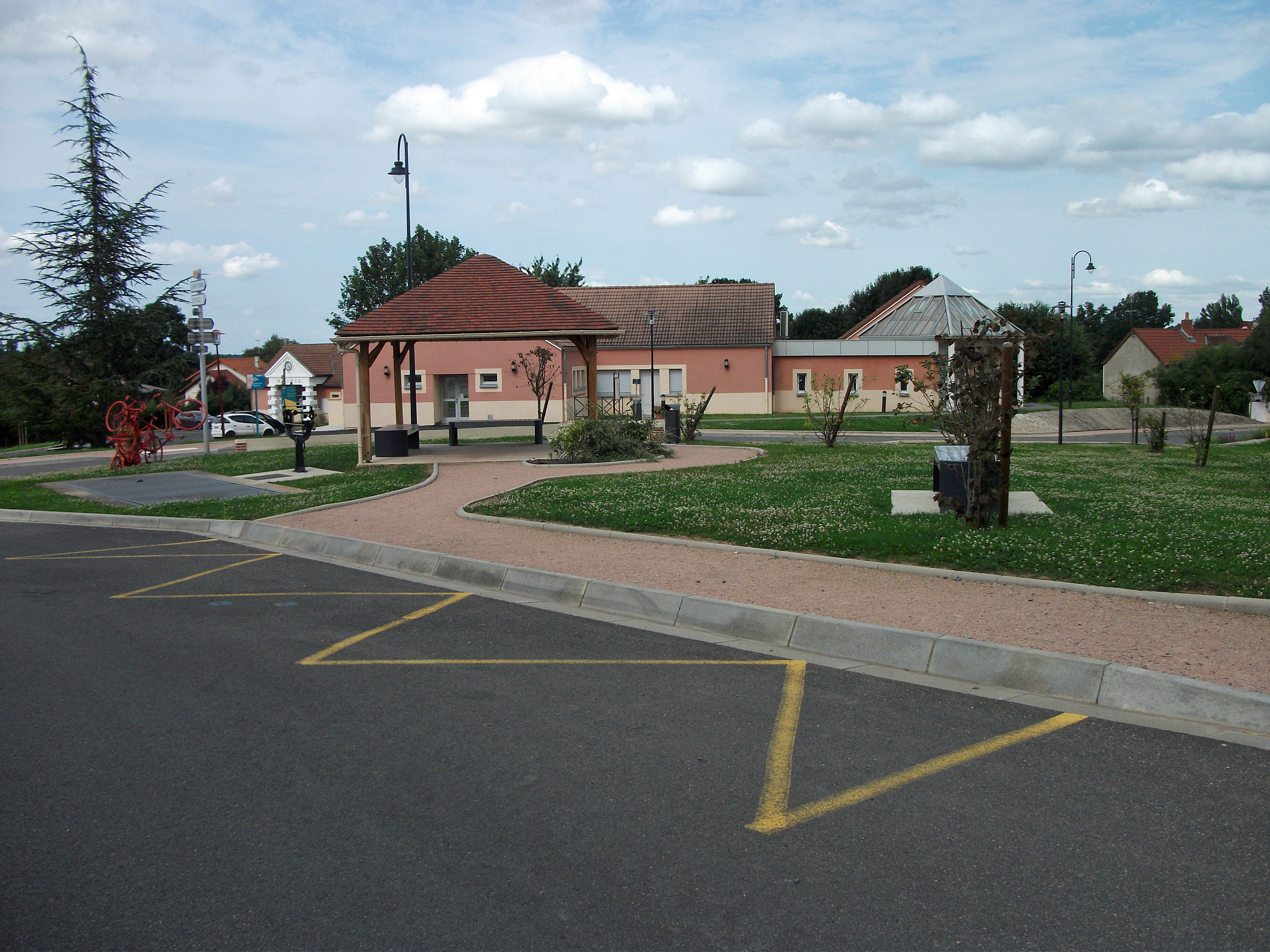 Espinasse-Vozelle : place Saint-Clément et arrêt de bus de la D 215 avec la salle annexe au deuxième plan et la mairie au troisième plan.